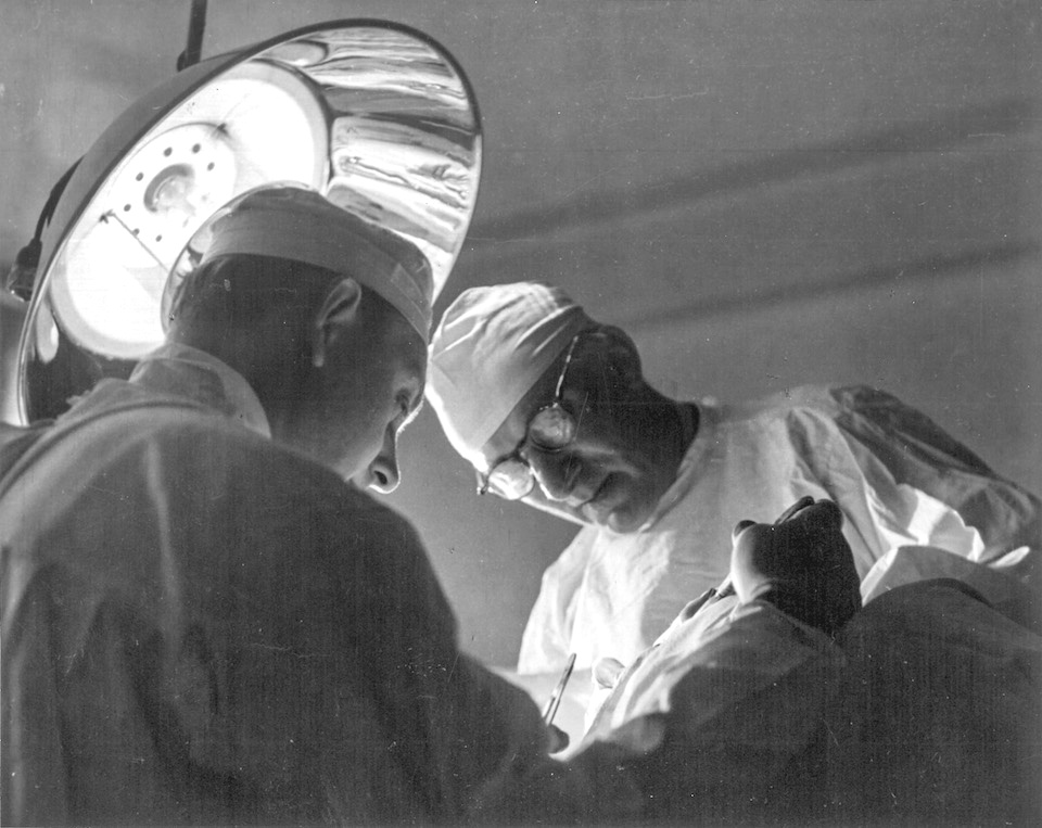 František Neuwirth na operačním sále Stomatologické kliniky v Praze léta (datum na scanu je hrubý odhad)